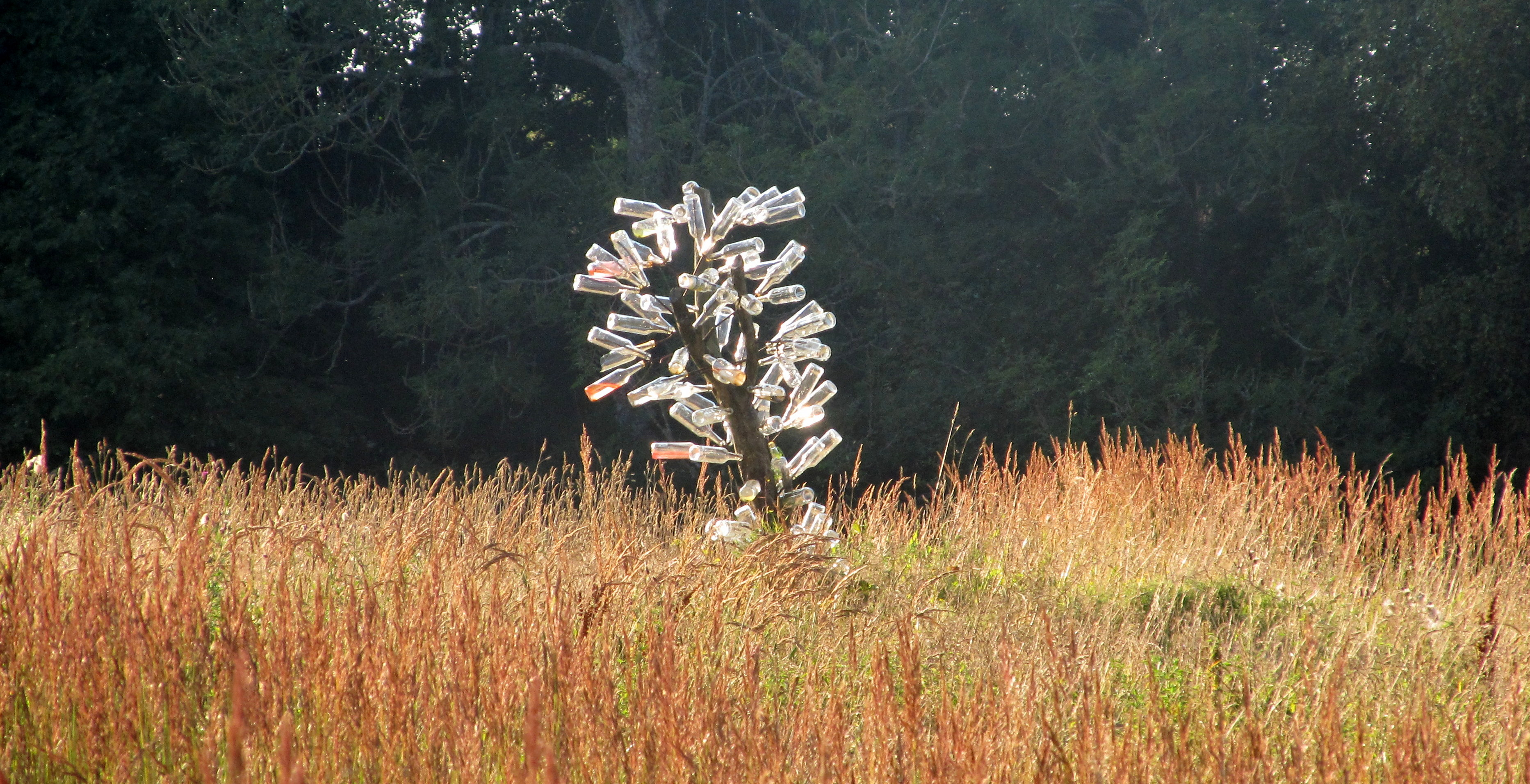 Hüti klaasikoja asukoht